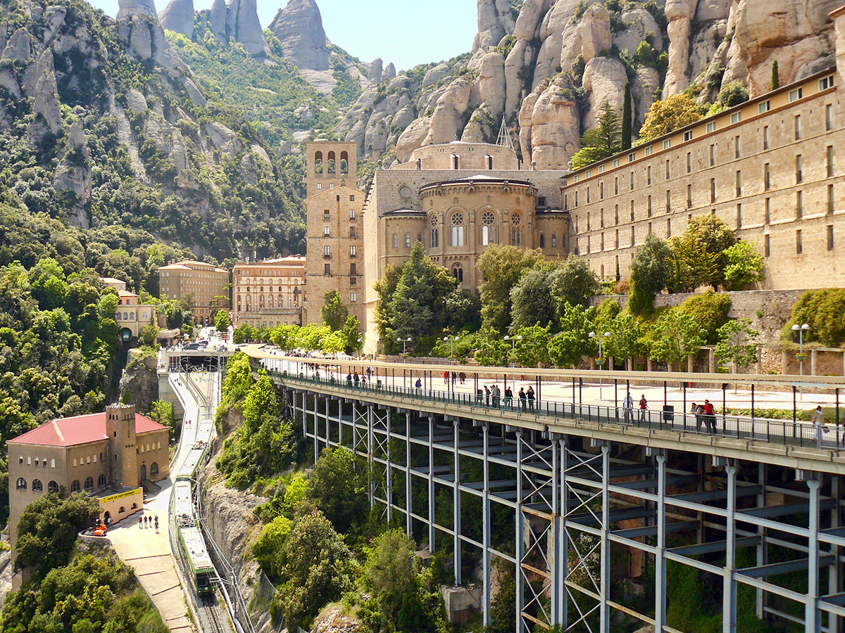 Abadia de Montserrat